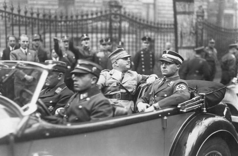 Stabschef Röhm und Gruppenführer und Staatsrat [Karl] Ernst